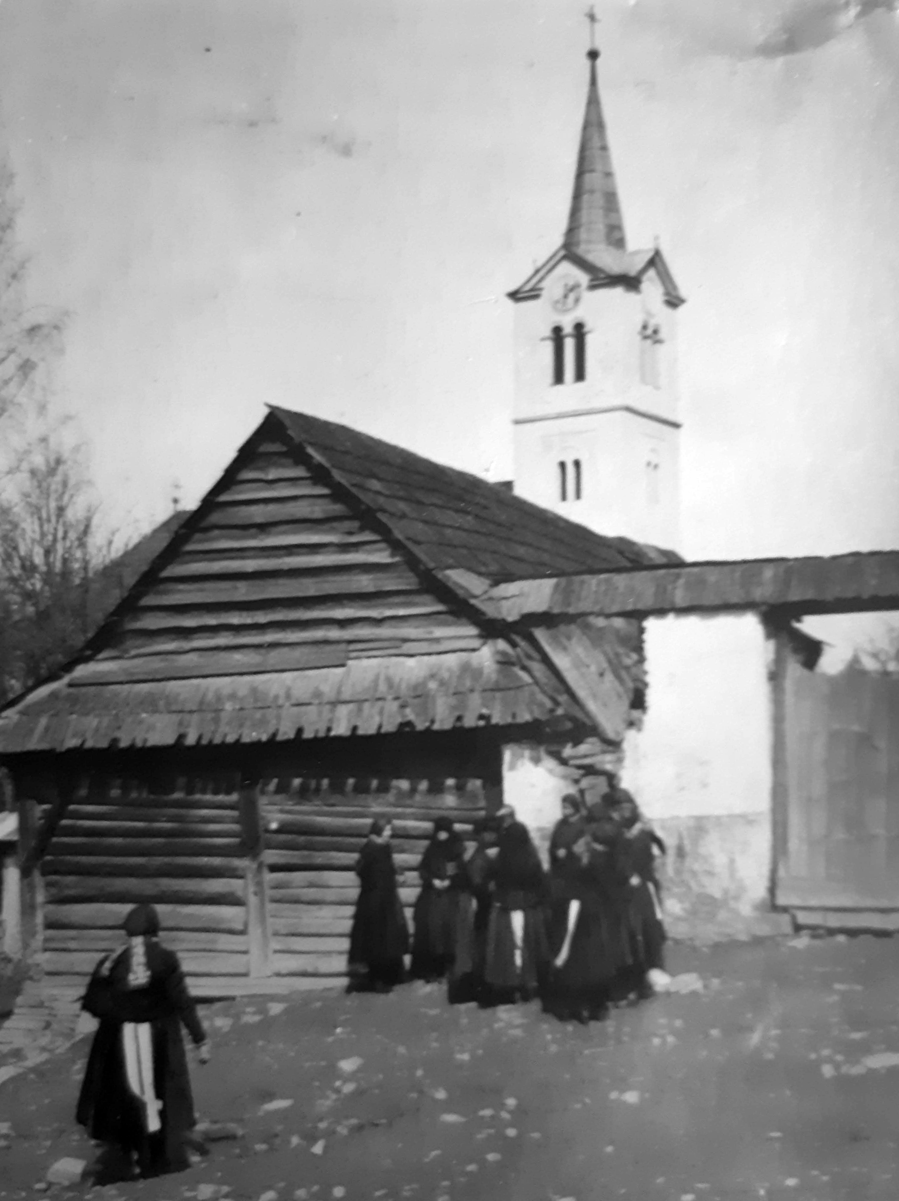 Kirche von KleinLomnitz mit Frauen, Slovakei